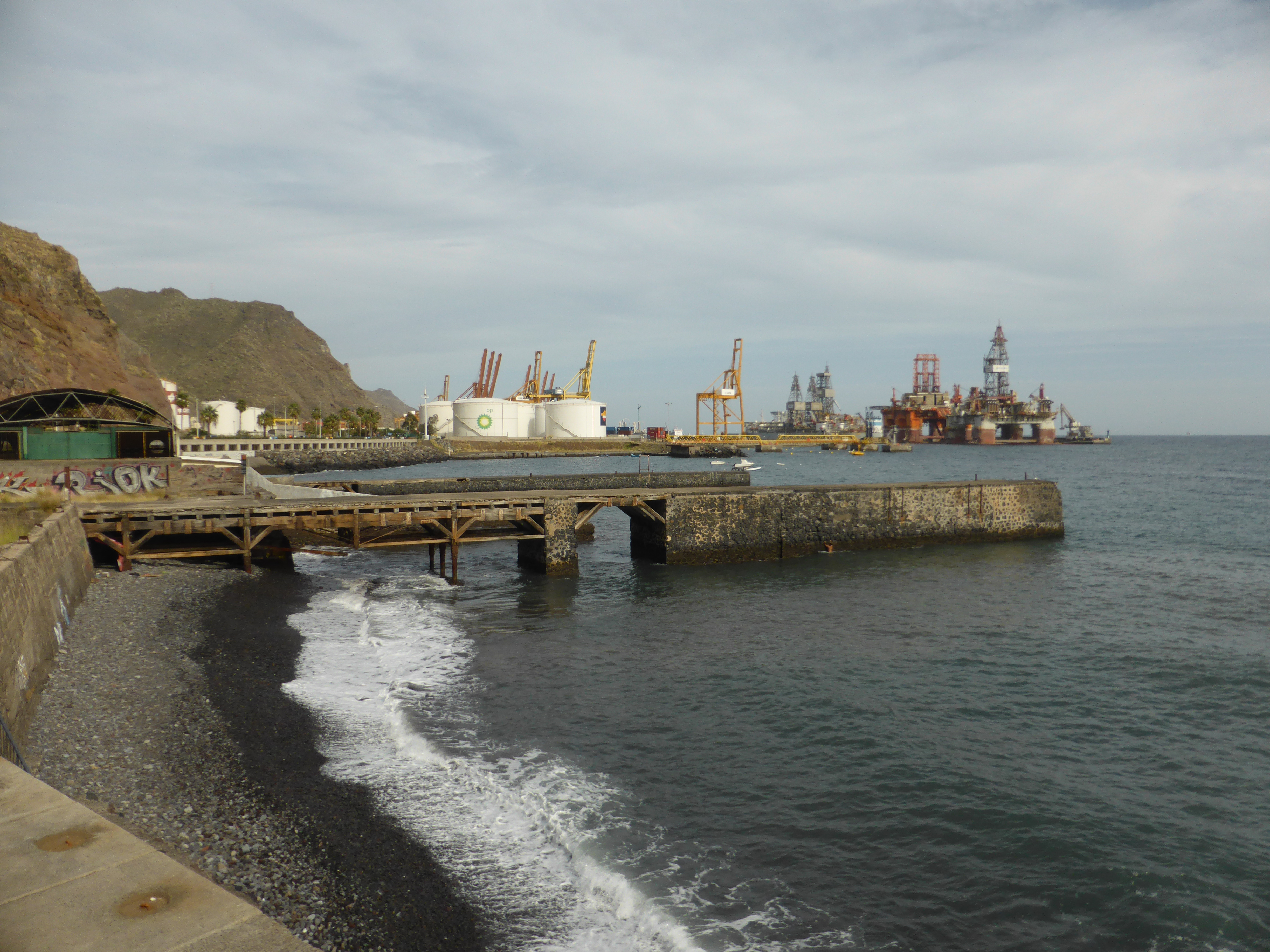 En el término municipal de Santa Cruz de Tenerife, junto a la carretera de San Andrés, frente al barrio de Valleseco, en la línea de la costa, se encuentran antiguos muelles y un varadero. Dos de los muelles eran carboneros, para cargar y descargar carbón de las gabarras. En el muelle de la compañía "Cory Brothers and Company Ltd", trabajaba una grúa de vapor que funcionó hasta el año 1956. Otro muelle, actualmente desaparecido, servía para cargar pescado seco, pues en las inmediaciones se encontraba una fábrica de salazones de pescado, junto al puente de Valleseco. Al fondo, en el Dique del Este, vemos atracadas 2 plataformas perforadoras petrolíferas contratadas -hasta 2015- por la compañía brasileña PETROBRAS a la noruega Seadrill. A la derecha, en la punta del Dique del Este se encuentra la plataforma "West Taurus", matriculada en Panamá, IMO: 8768414, construida en 2008, y temporalmente atracada en Tenerife, a la espera de órdenes. La otra plataforma es la "West Eminence", también matriculada en Panamá, del año 2009, pintada en color naranja.